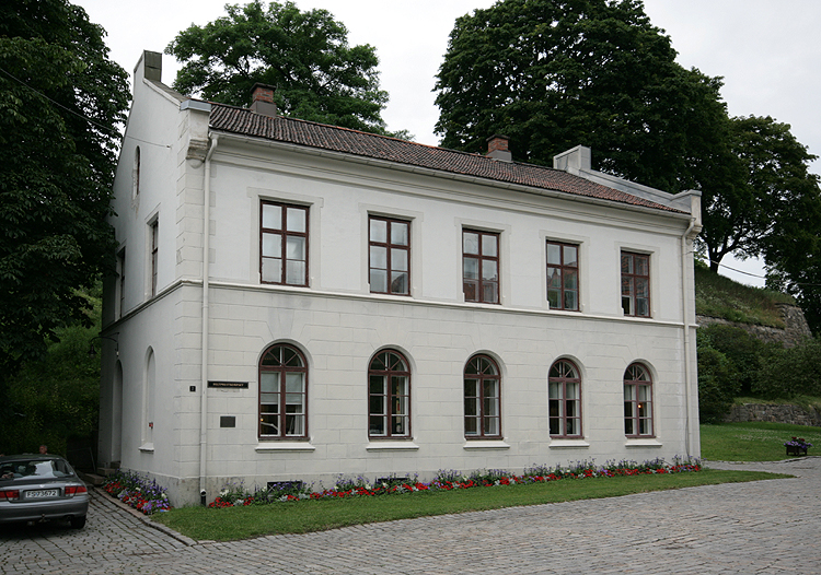 Fengselsdirektørboligen, Akershus festning. Bygd 1858.